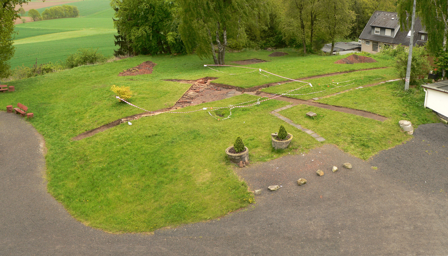 Ausgrabungsgelände der Glashütte Klein Süntel